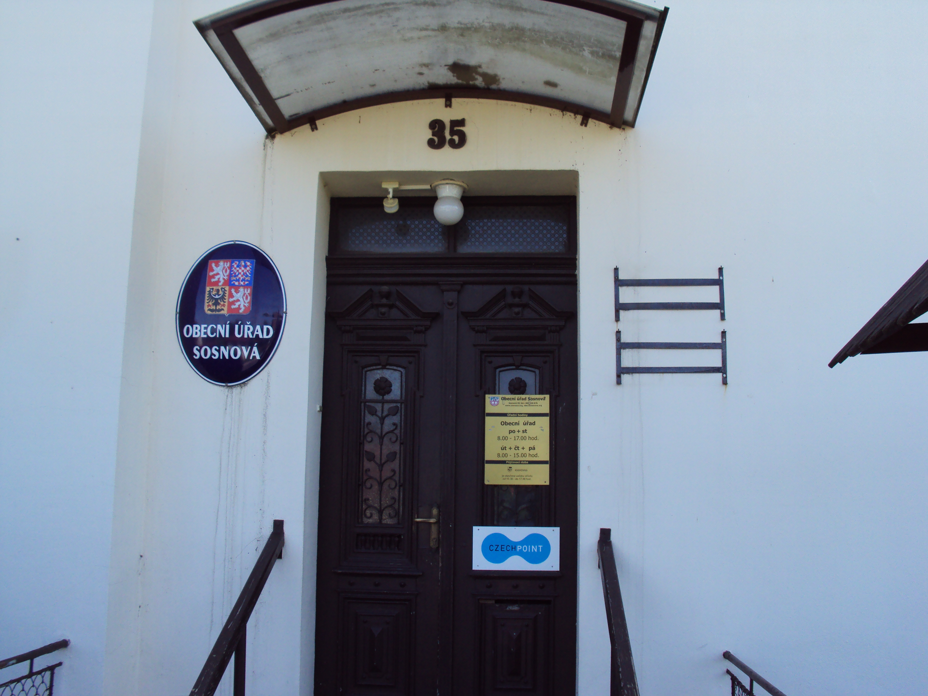 Detail obecního úřadu v Sosnové na Českolipsku